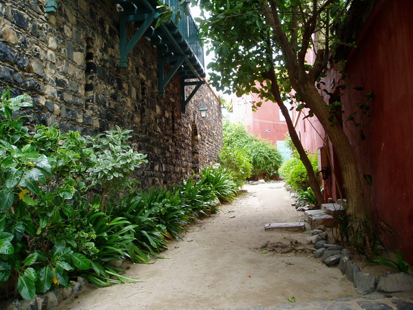 A street in Gorée island.